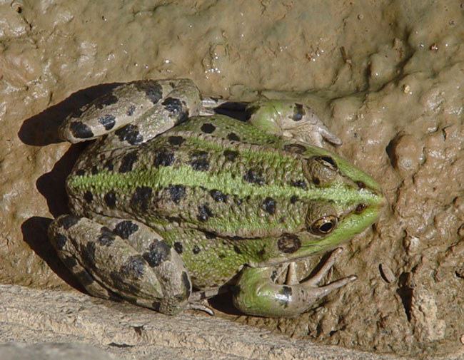 Rana ridibunda